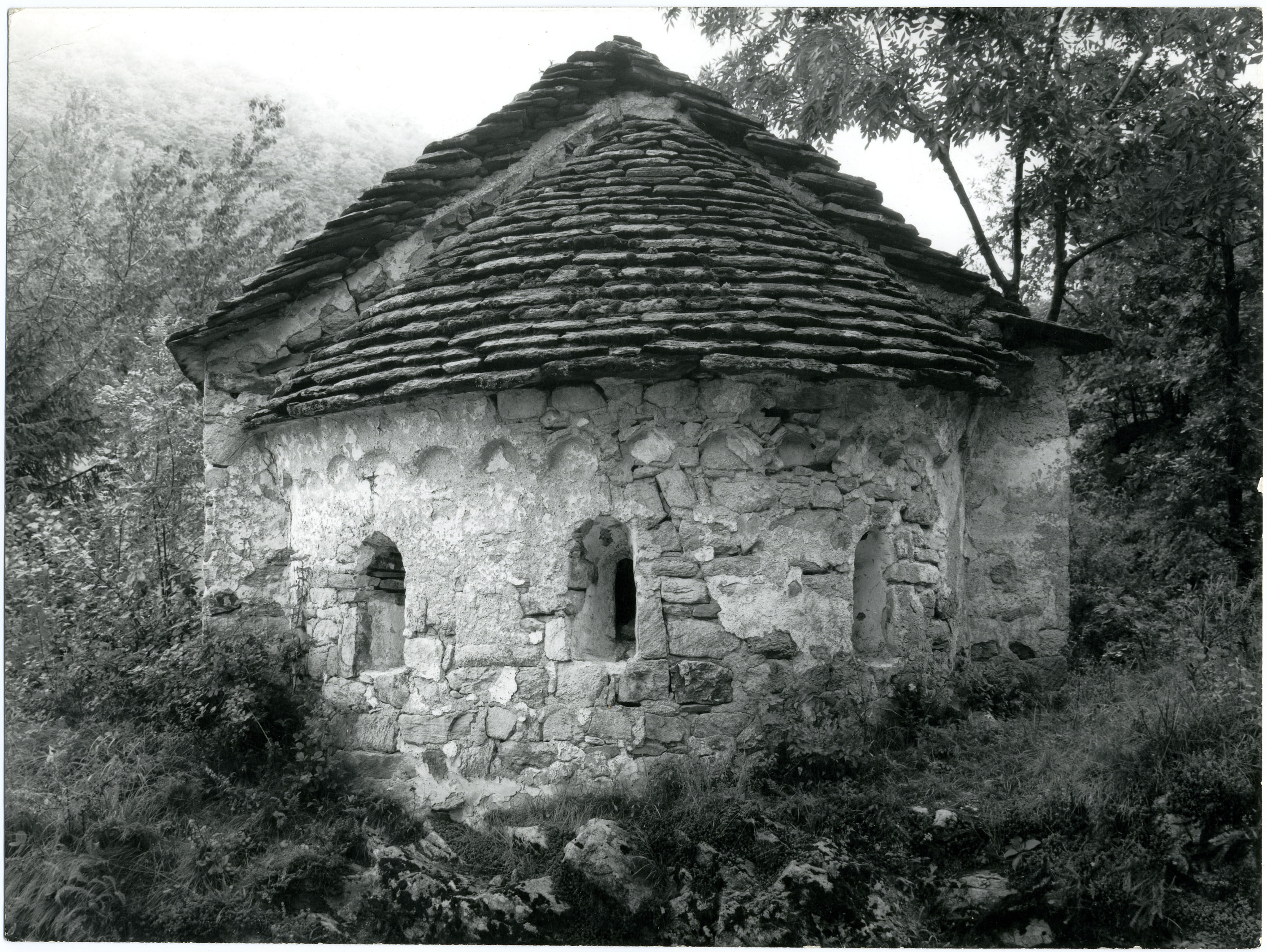 Somadino di Casargo - Chiesa di S.ta Margherita. Archivio Pietro Pensa, fondo fotografico, selezione di Elvia Redaelli, 2008, n. 84.